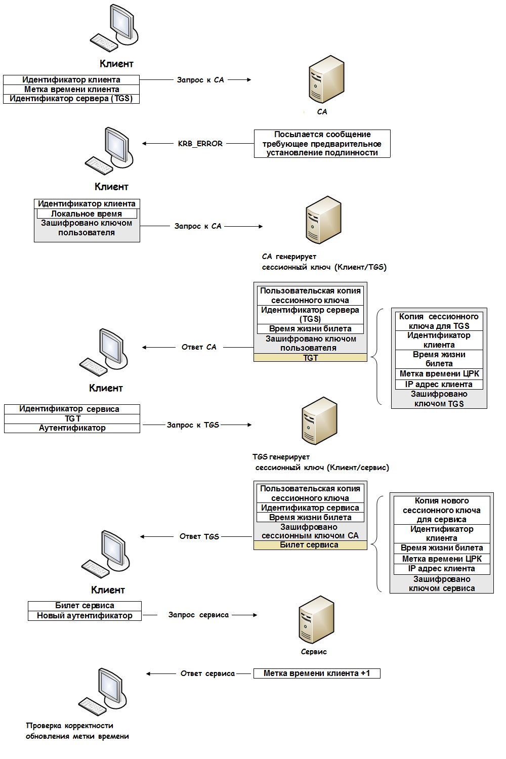 Этапы авторизации в Kerberos 5